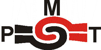 Emblema del antiguo Partido Mexicano de los Trabajadores (PMT) de México, el PMT fue liquidado como partido político en 1987 al fusionarse con otras organizaciones. Al ocurrir esto desapareció como entidad legal ante la ley mexicana y ninguna otra organización fue su sucesora en su denominación o emblema Seal of the ancient Mexican Worker's Party (PMT) of México, the PMT was existed untill 1987, when was disolved after lost his legal register. The PMT was disapered like a organization for the mexican electoral law and any other organization keep the name of seal.